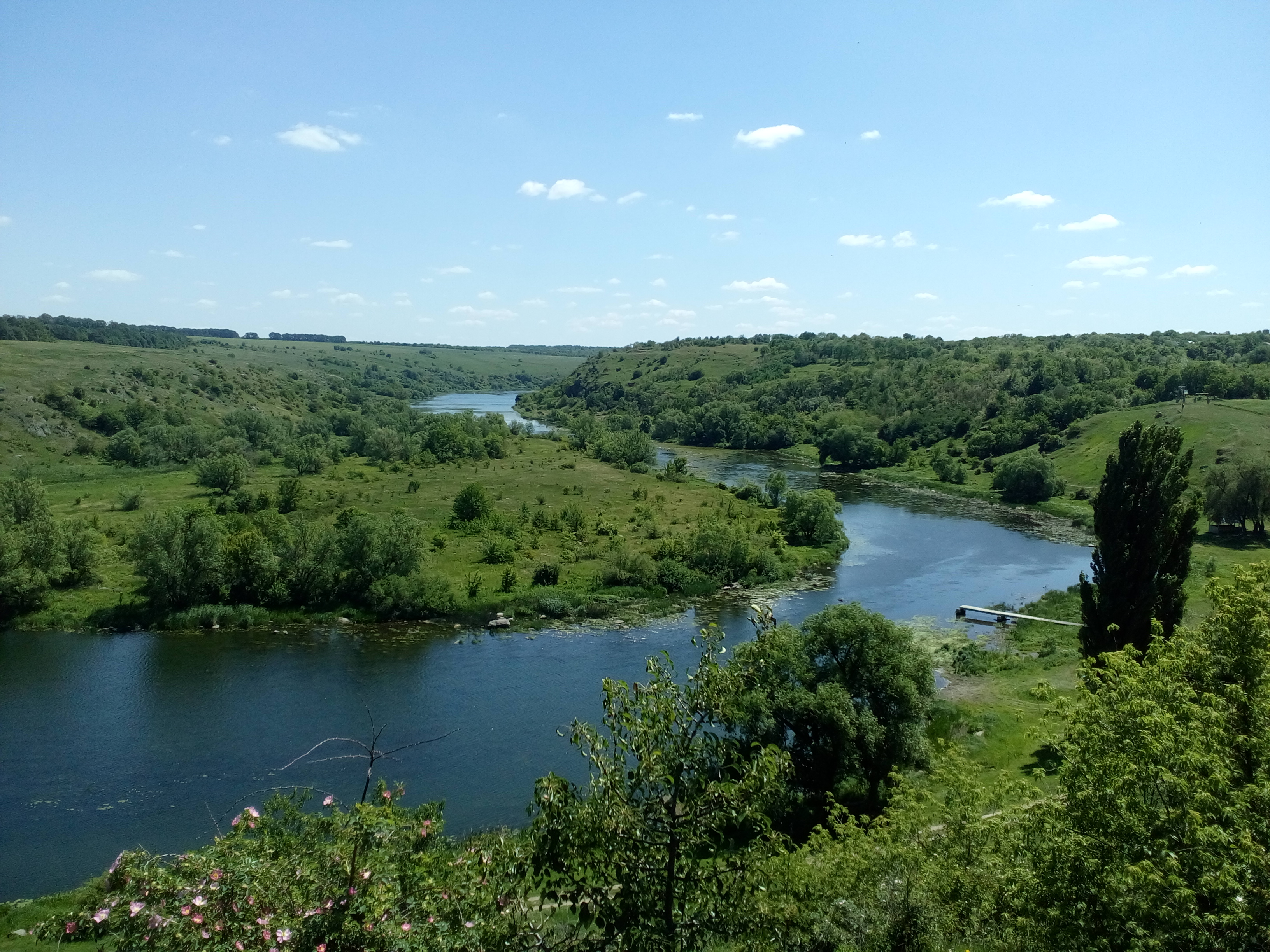 «Казавчинські скелі», Гайворонський район с. Казавчин